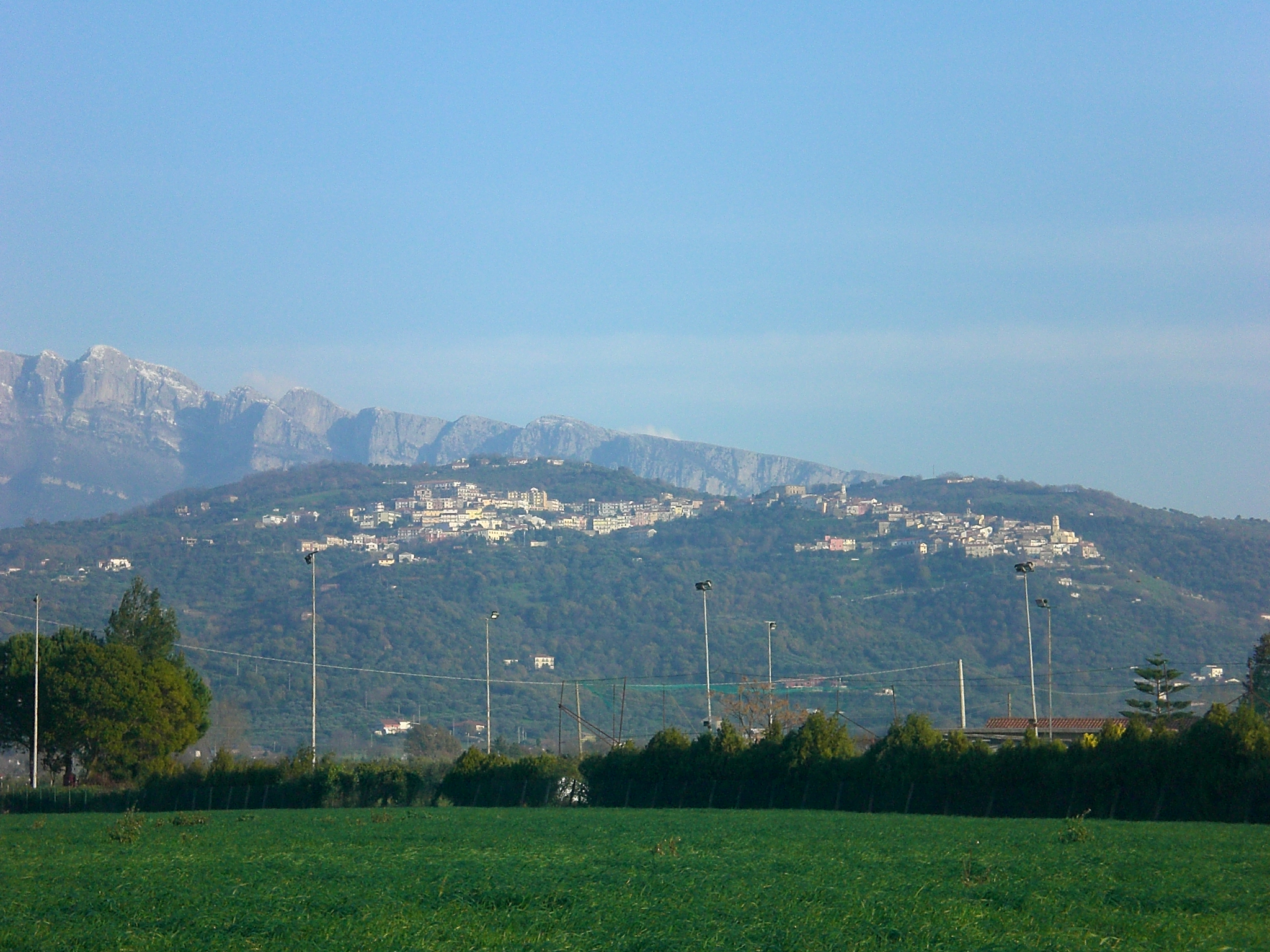 Veduta di Altavilla Silentina.